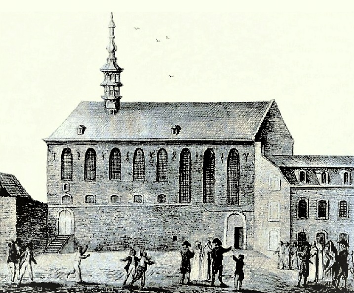 ehemaliges Annuntiatenkloster am Annuntiatenbach in Aachen vor 1875, anschließend niedergerissen